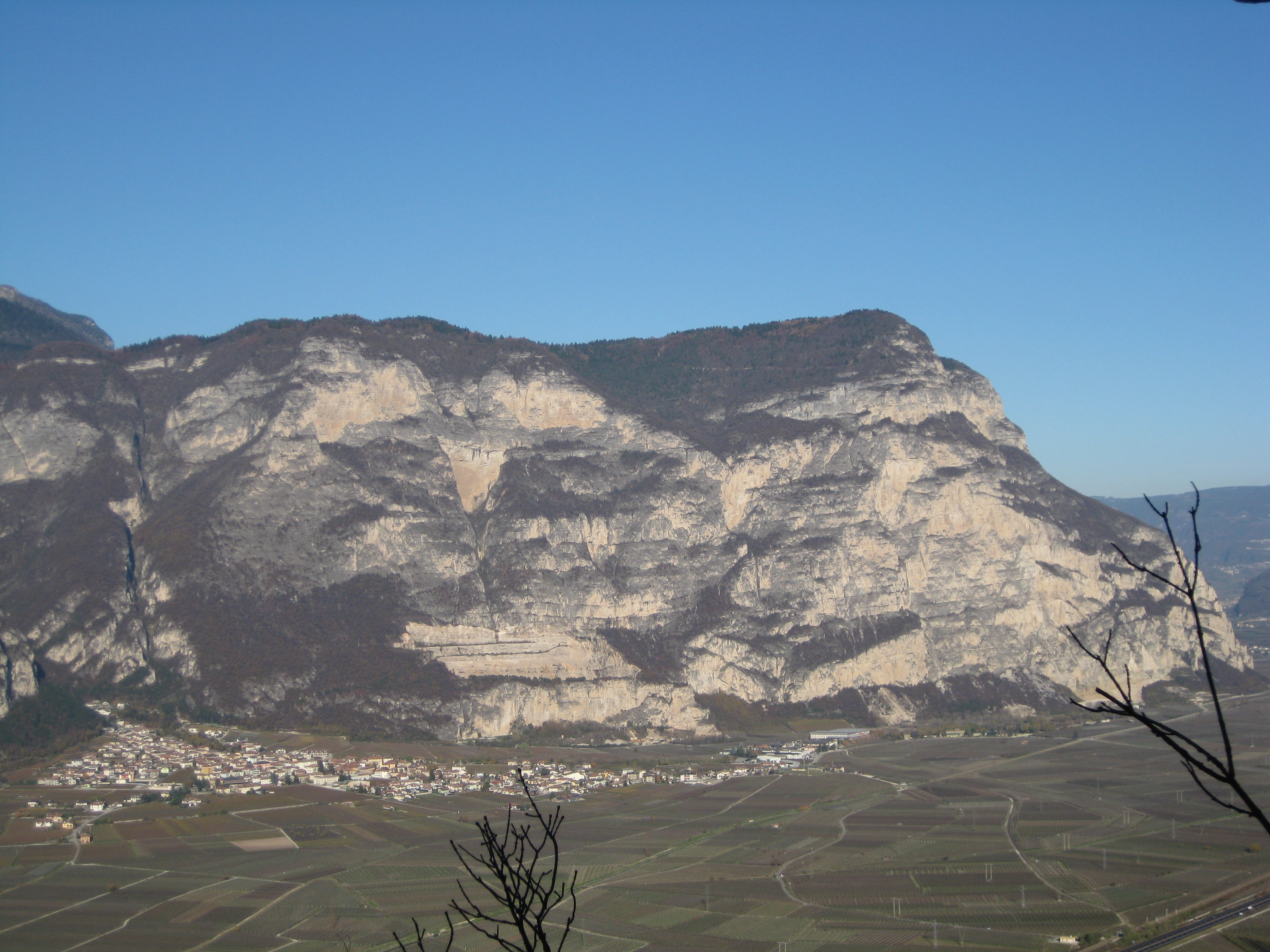 Der Fennberg von Süden fotografiert, davor Roverè della Luna